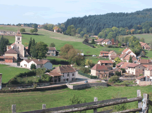 Petit village du Brionnais en saône-et-Loire (71), Bourgogne, France